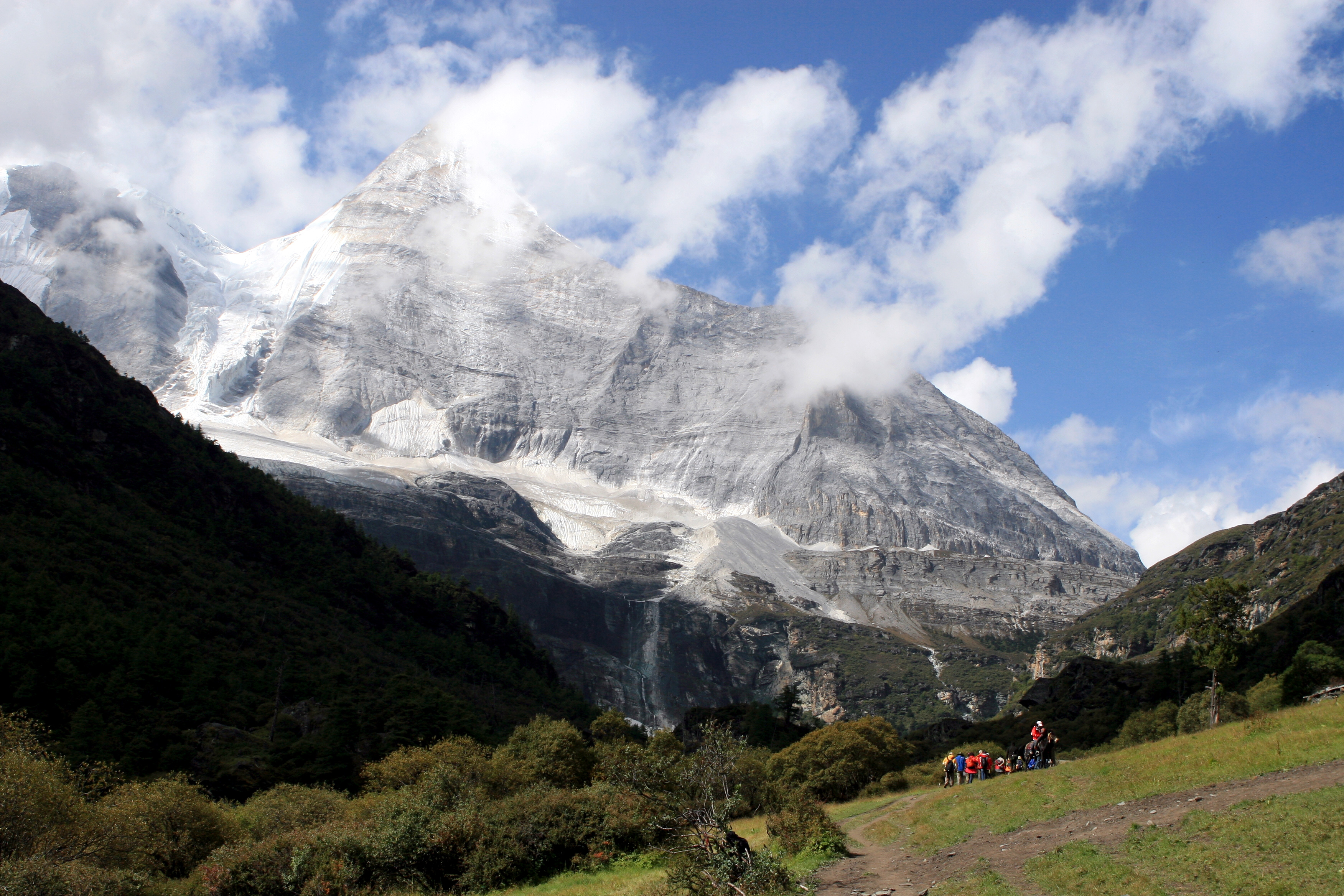 Piste de Ganzi, dans la région tibétaine Kham du Sichuan, Chine